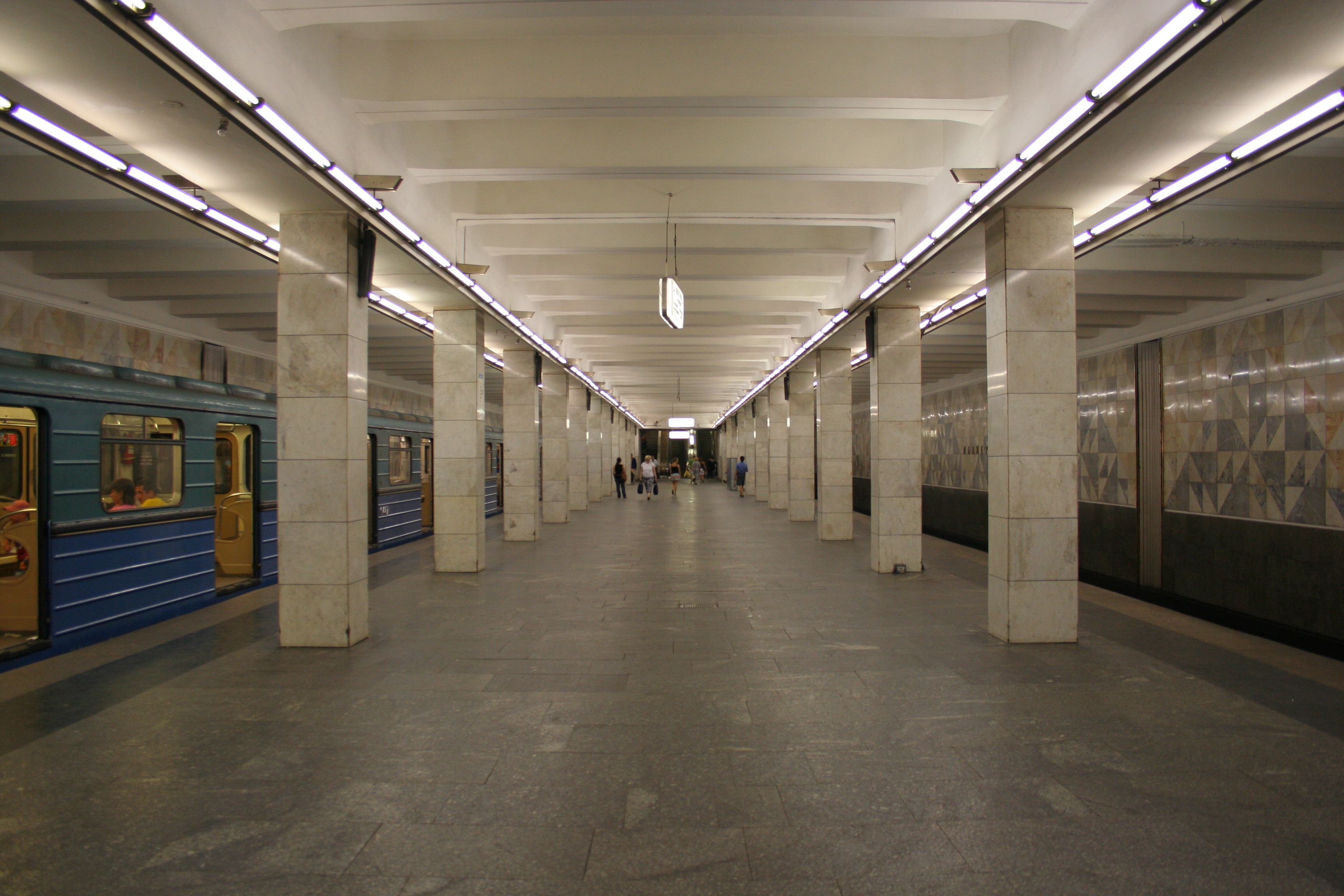 U-Bahnhof Planernaja der Metro Moskau